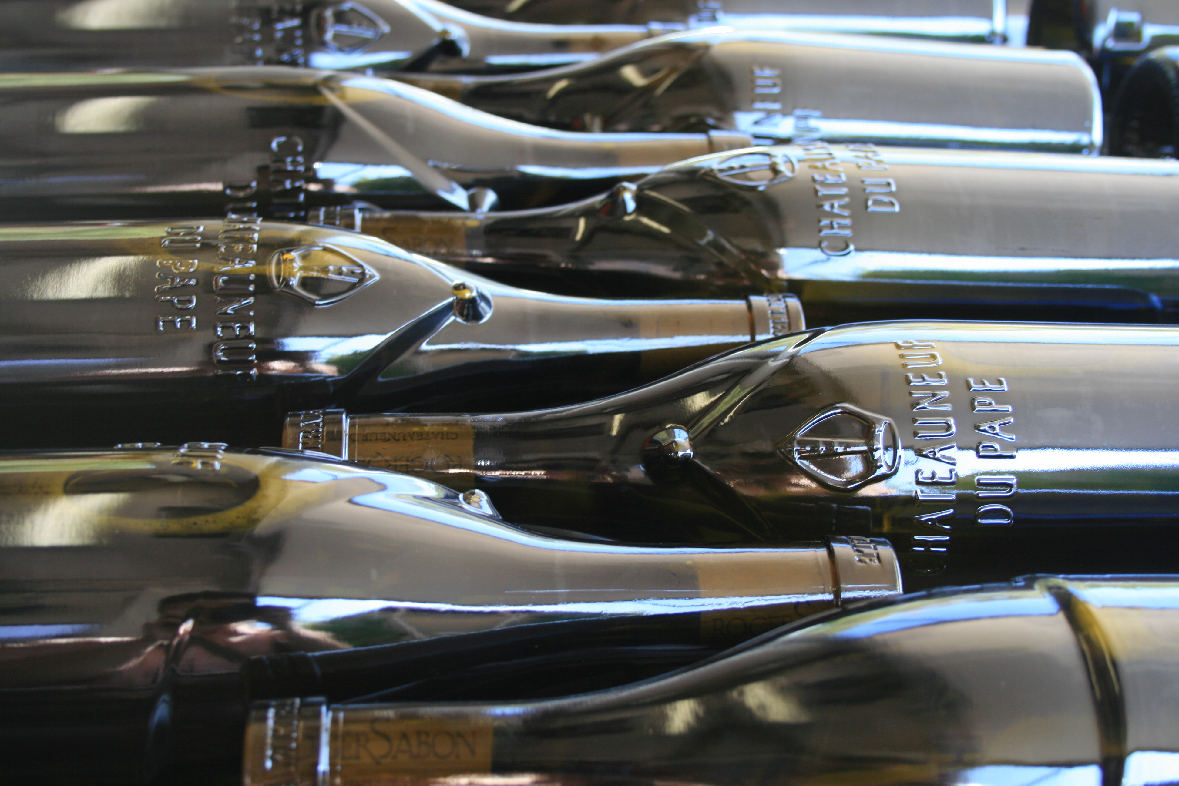 Embouteillage au domaine Roger Sabon à Châteauneuf-du-Pape